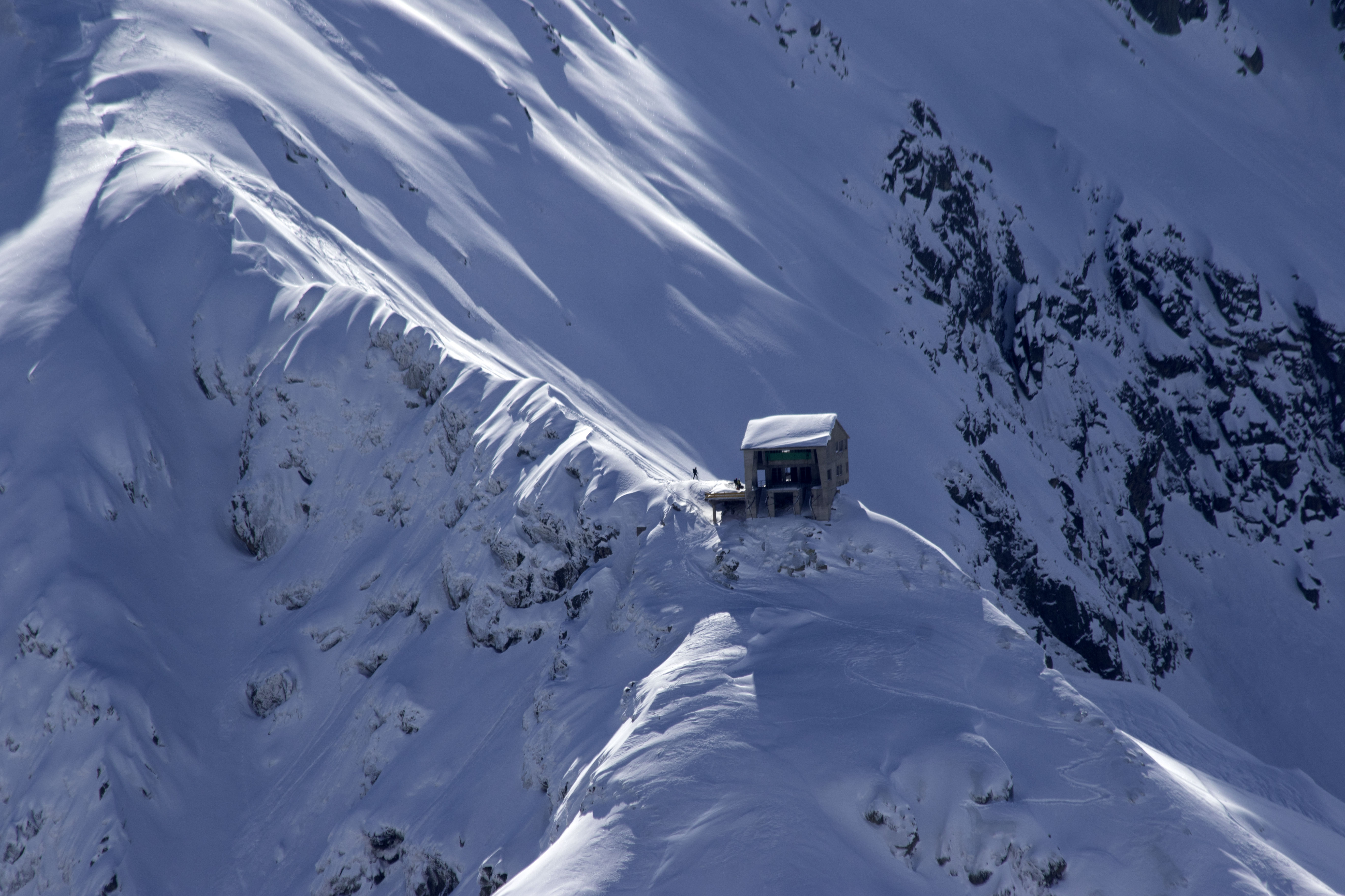 Riserva speciale del Sacro Monte di Oropa (Q47362077)